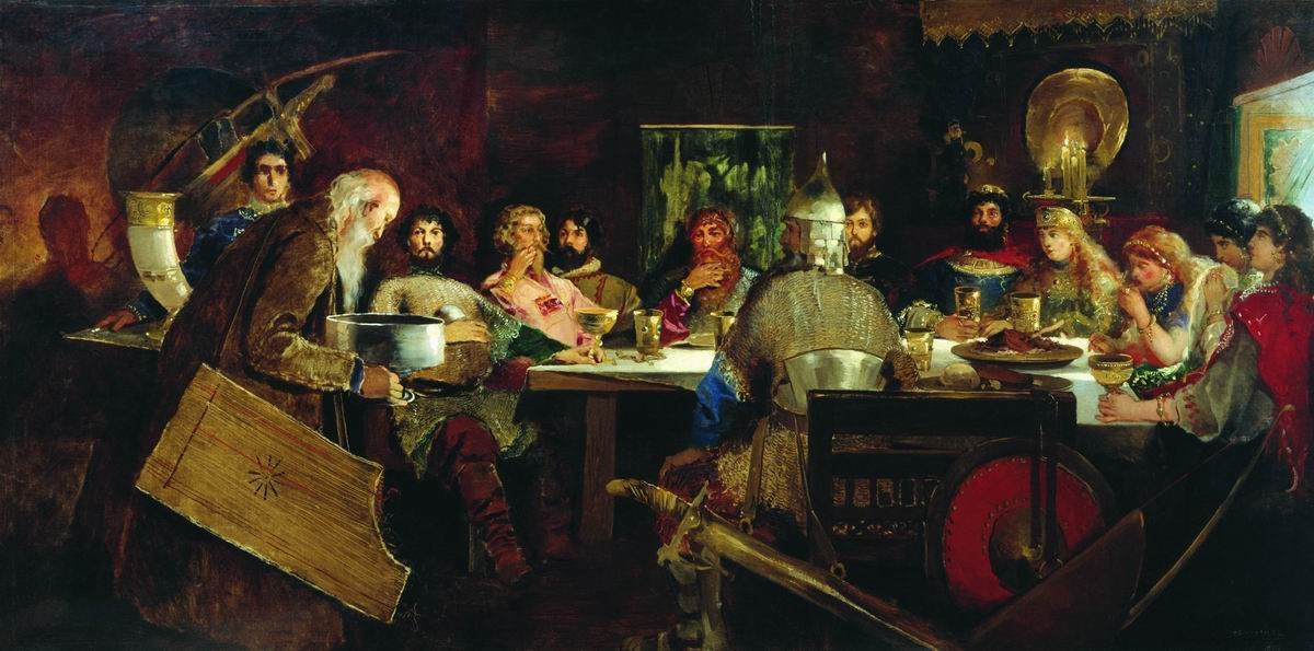 Пир богатырей у ласкового княза Владимира. 1888. Холст, масло. 130x260 см. Государственный музей-заповедник "Ростовский Кремль", Ростов